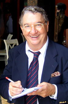 O músico brasileiro Caçulinha (Rubens Antônio da Silva).